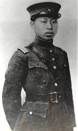 奉天派軍閥少尉時代の高志航。